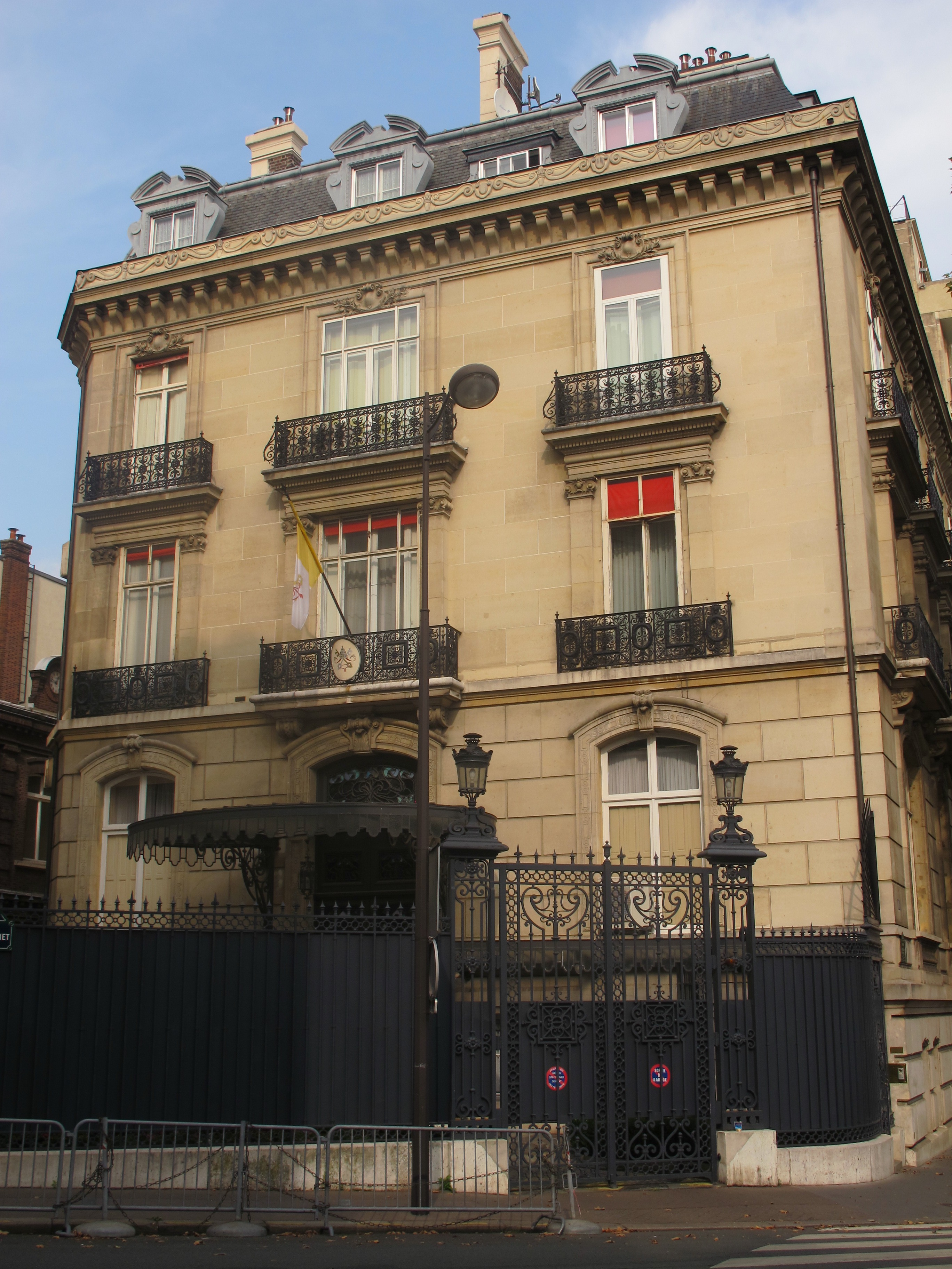 Nonciature apostolique en France, 4 rue Freycinet & 10 avenue du Président-Wilson (Paris, 16e).